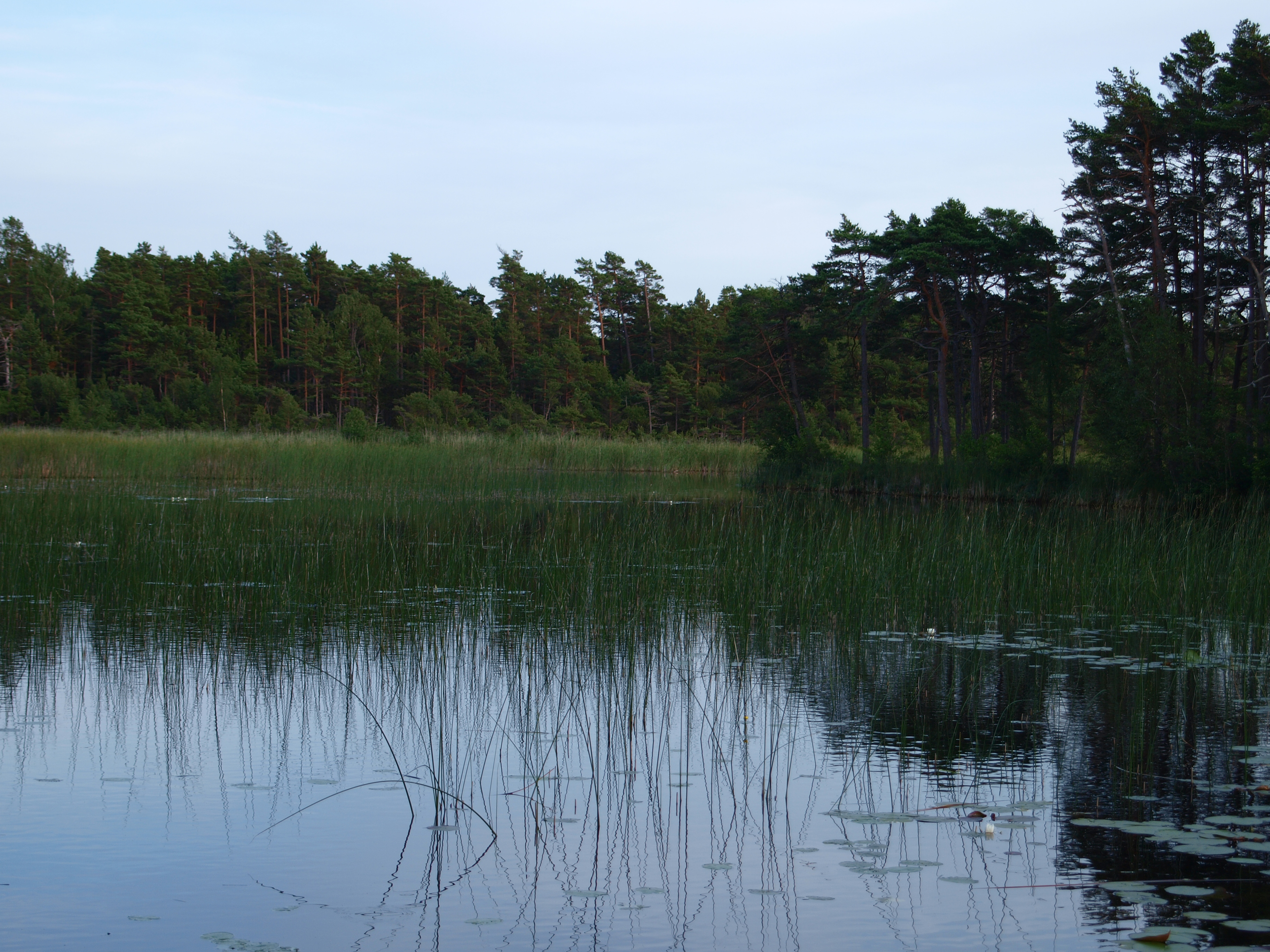 Pilt tehtud Perakülas Noarootsi vallas Läänemaal